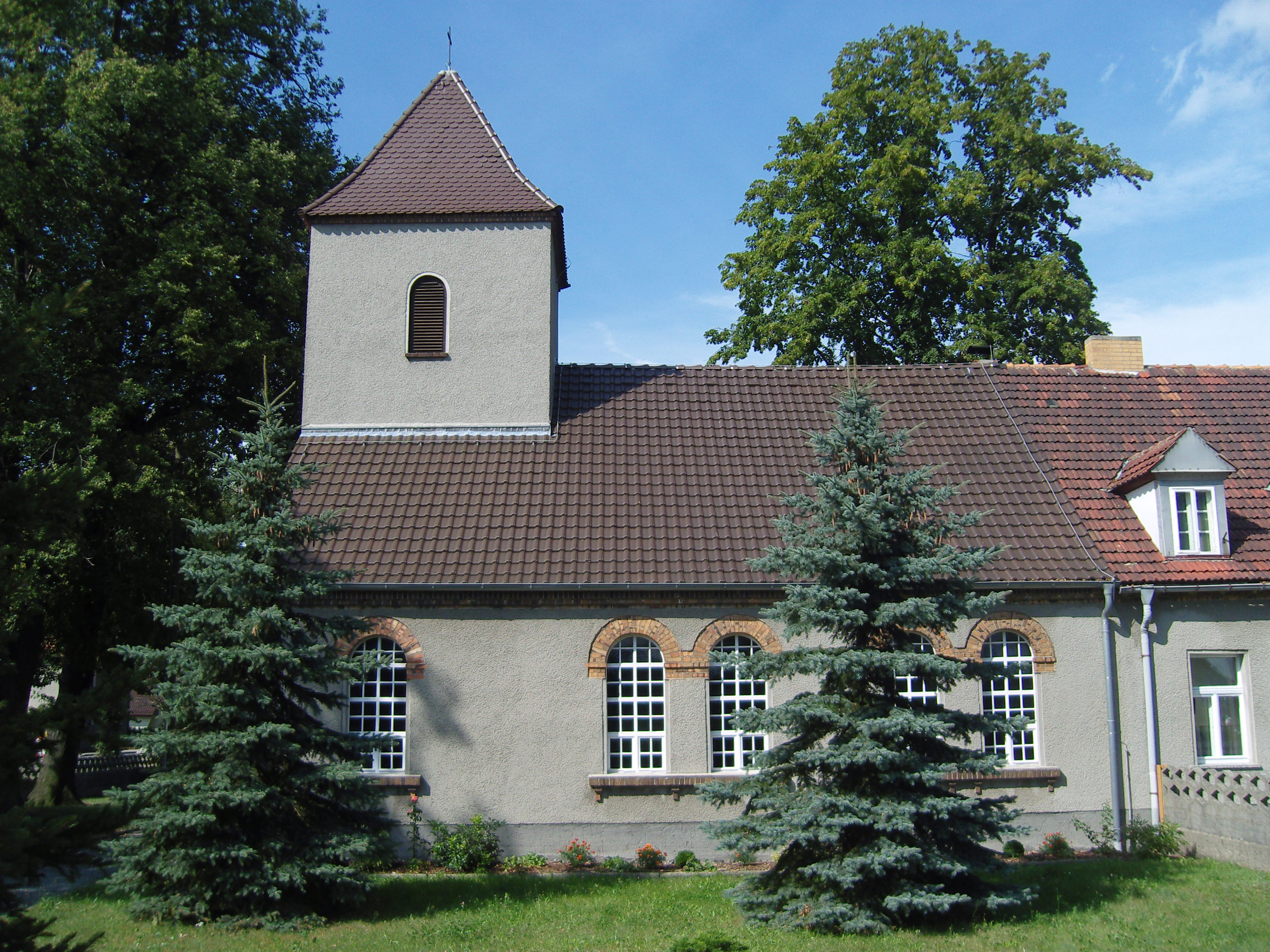 Kirche in der Gemeinde Schraden an der Tettauer Straße